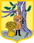 Coat of arms of gmina Sędziejowice